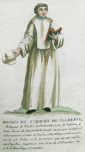 Collection de costumes de tous les ordres monastiques, supprimés à differentes époques, dans la ci-devant Belgique, Bruxelles, Philippe Joseph Maillart et sœur, 1811